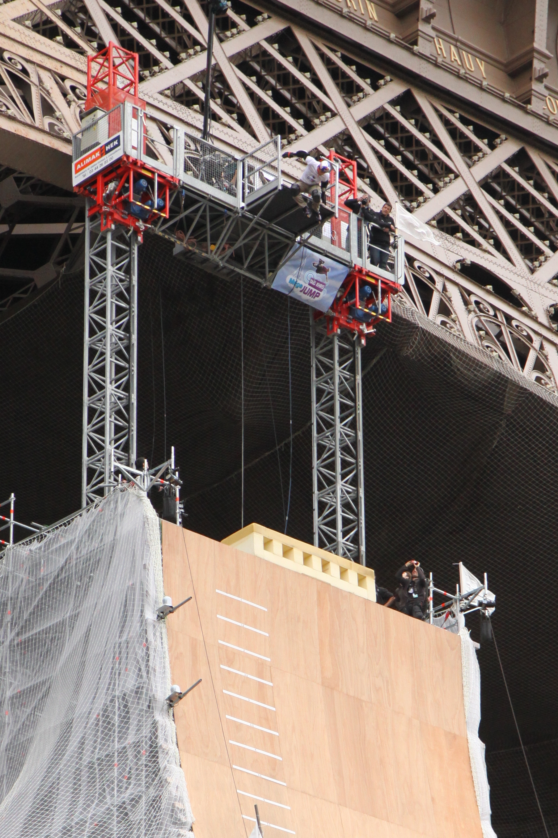 Record du monde de saut en roller à 12,50 mètre de haut sur une rampe de 40 mètres par Taïg Khris le samedi 29 mai 2010 devant la tour Eiffel à Paris. Le premier essai est un échec.